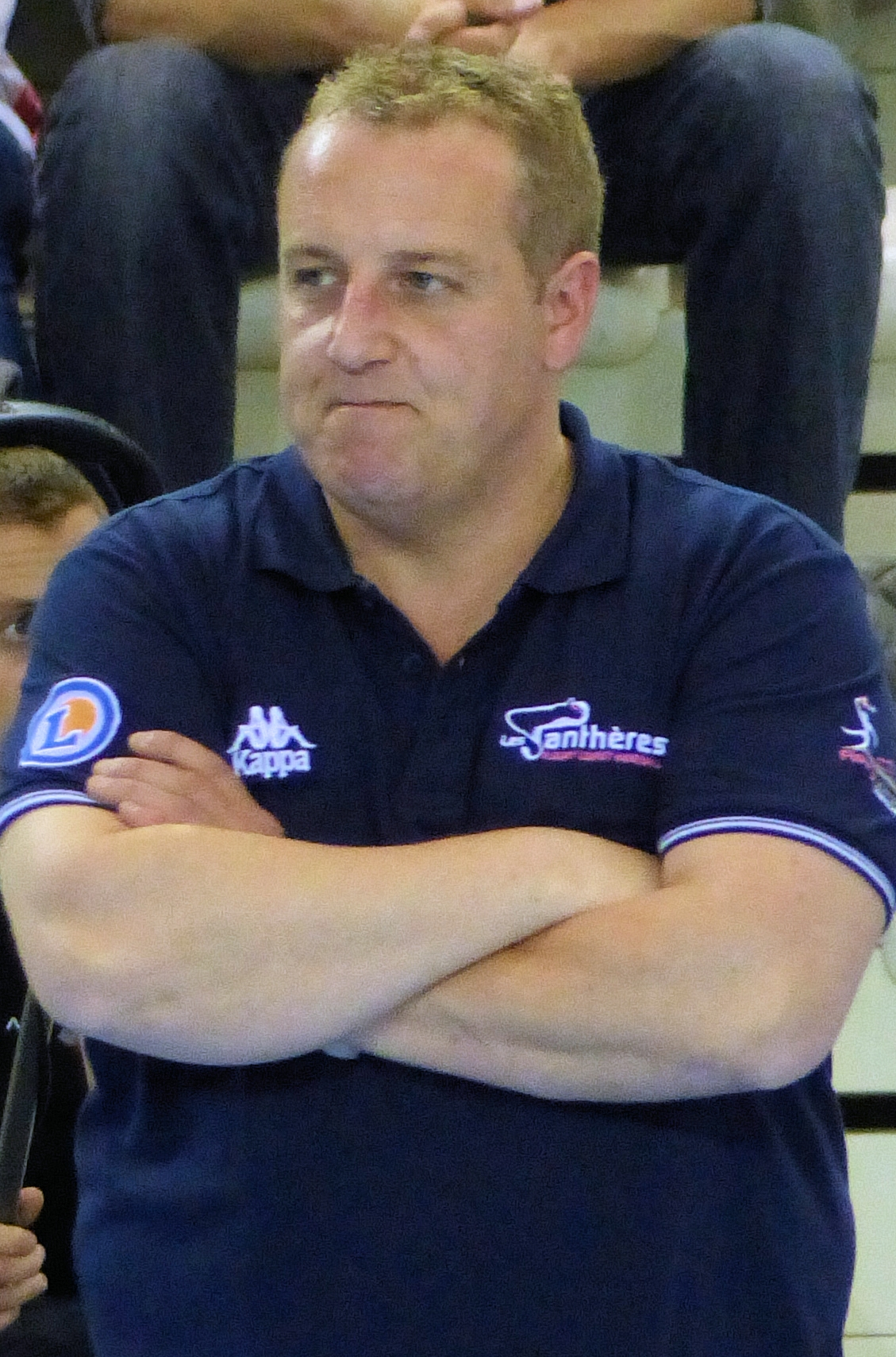 Frédéric Bougeant l'entraîneur de l'équipe de handball féminin Fleury Handball. Le 14 mai 2014.